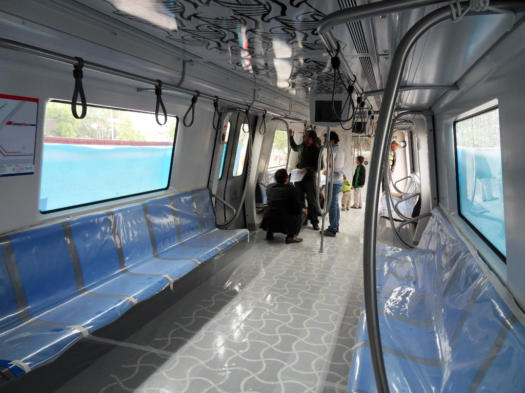 Kadıköy-Kartal-Kaynarca M4 vagonları.